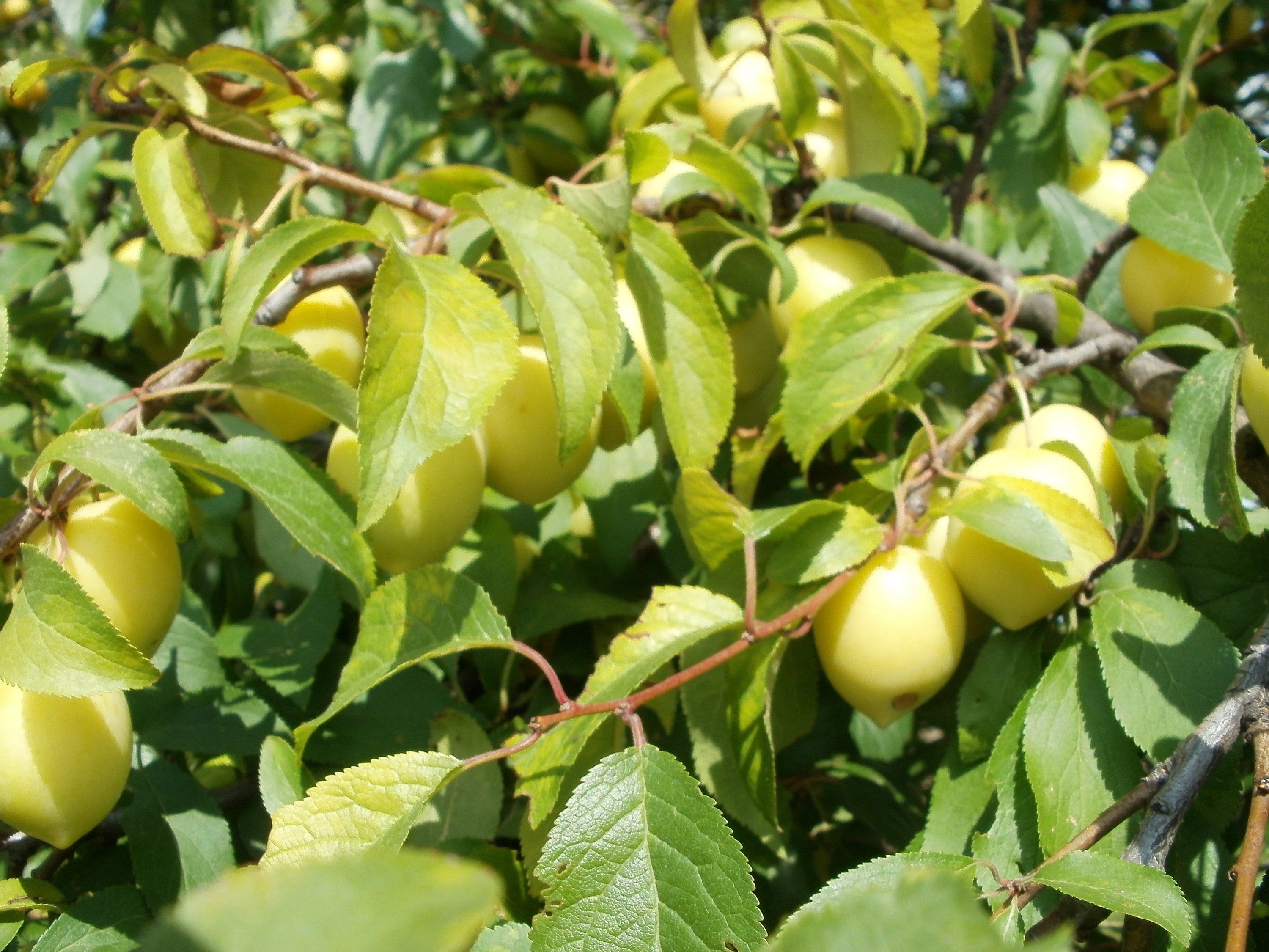 Kirschpflaume bei Reilingen